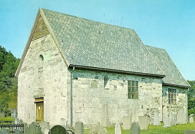 Moster gamle kirke